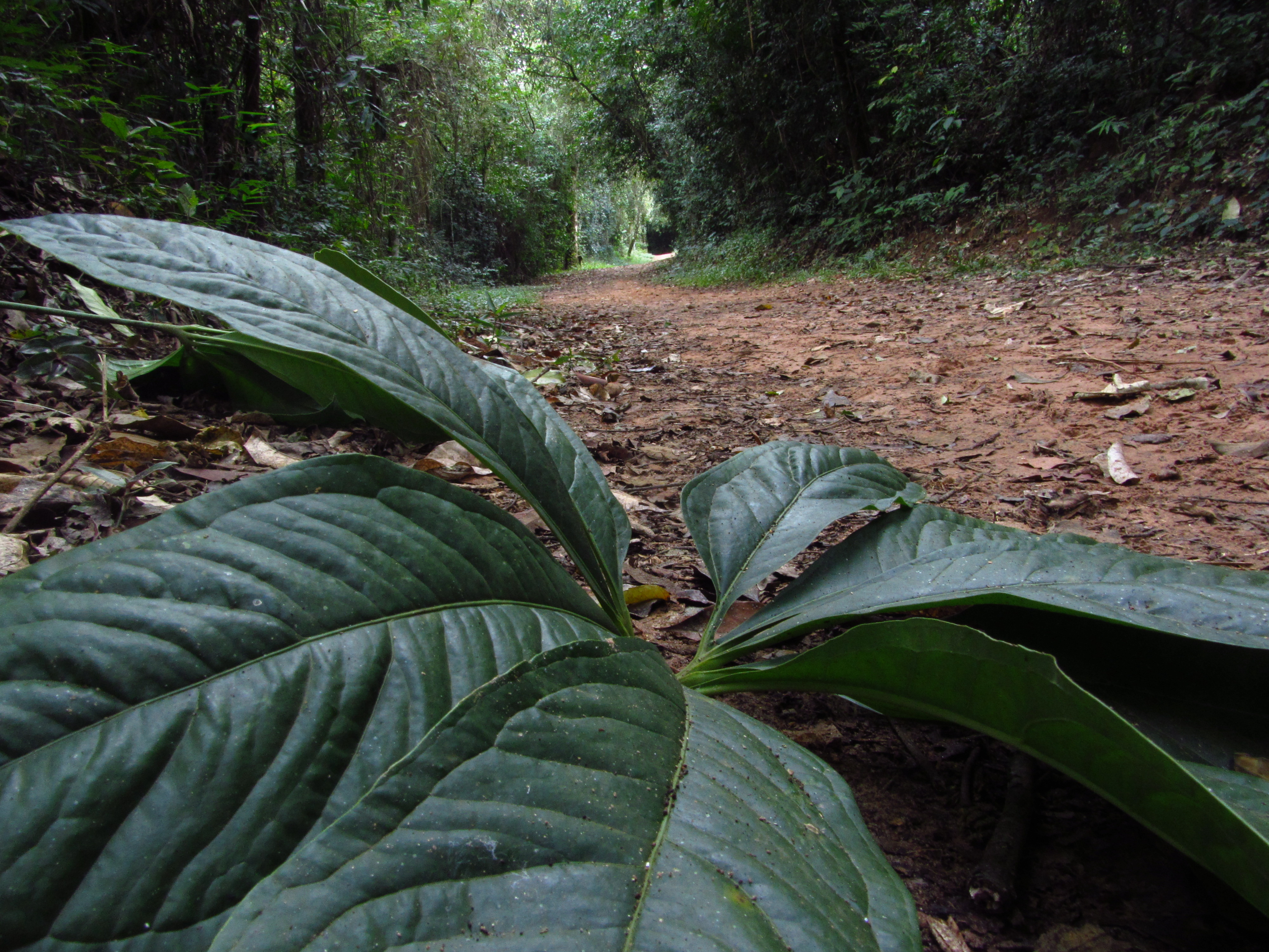 Folha em detalhe durante trilha no Parque Estadual Vassununga